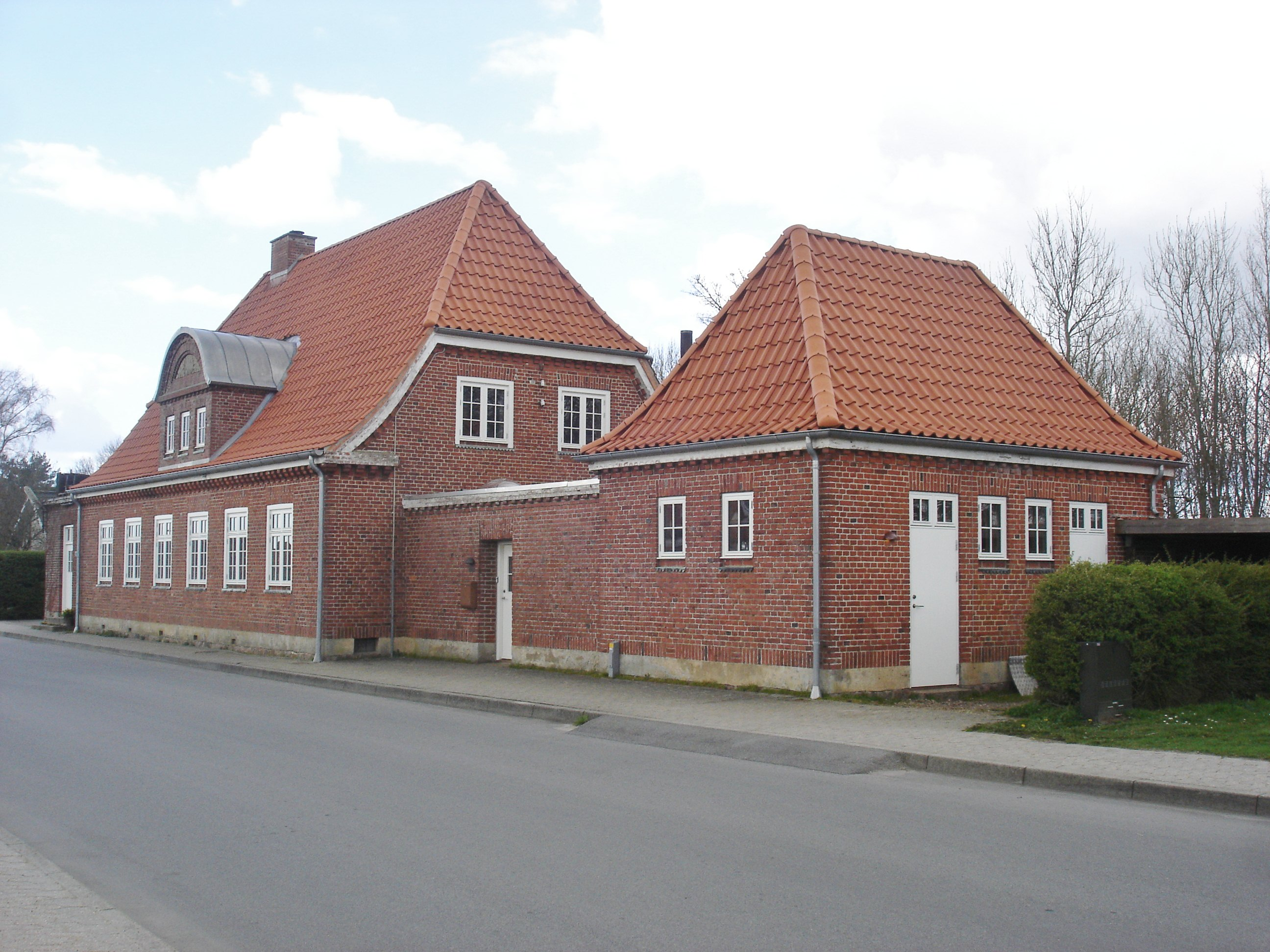 Gesten Station, vejsiden fra SØ